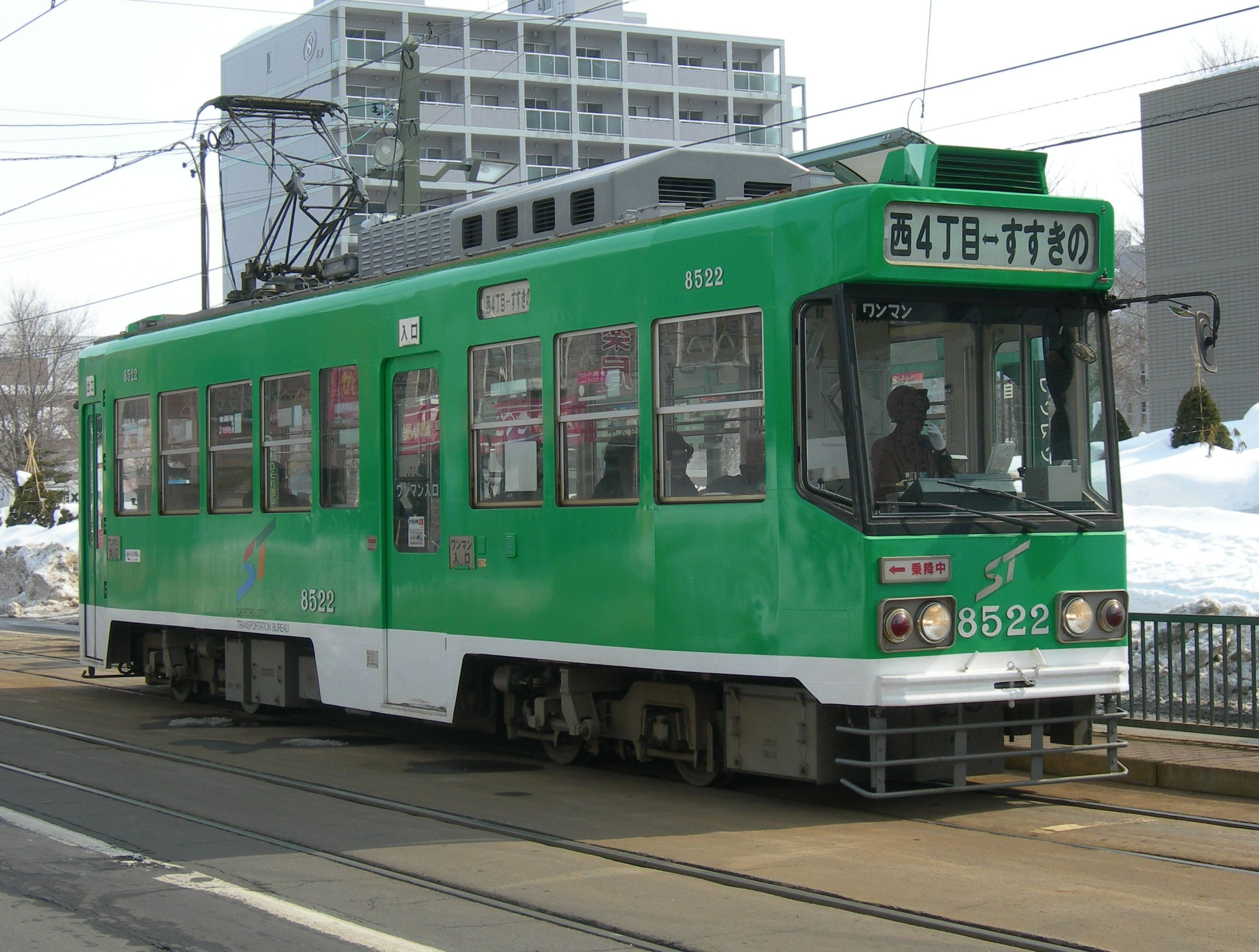 札幌市交通局8520形電車